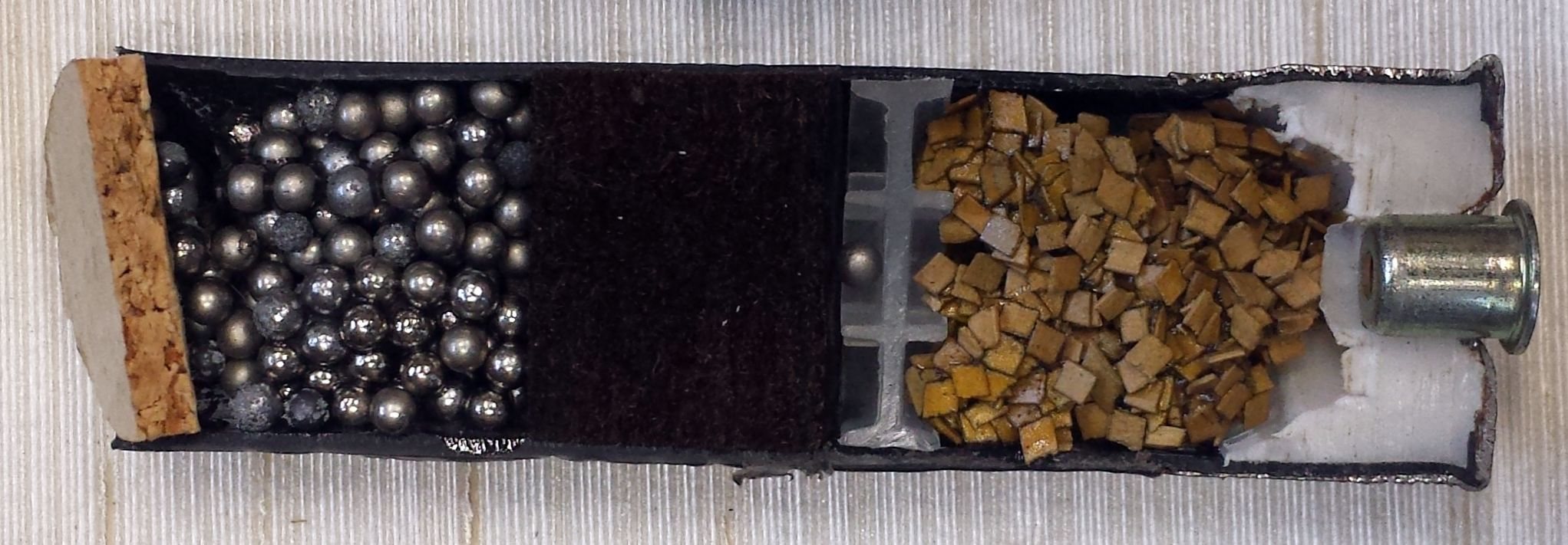 Pièces exposées au musée technique des poudres de l'armement à la Poudrerie de Sevran-Livry.